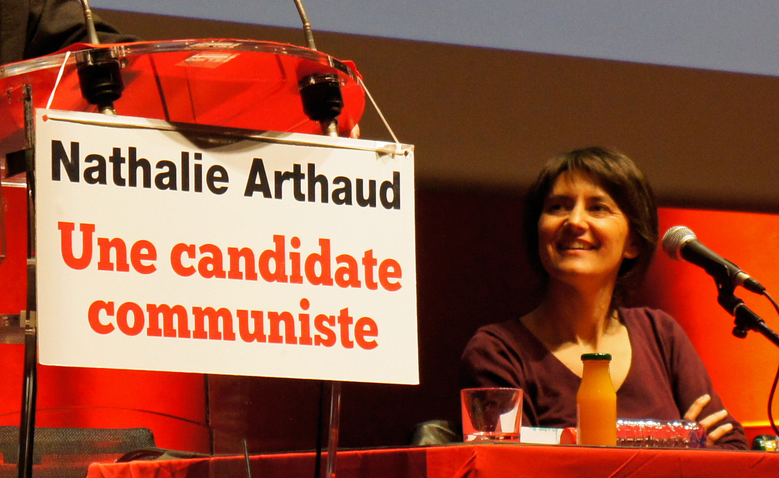 Nathalie Arthaud réunion de Reims pour la candidate à l'élection présidentielle 2012.